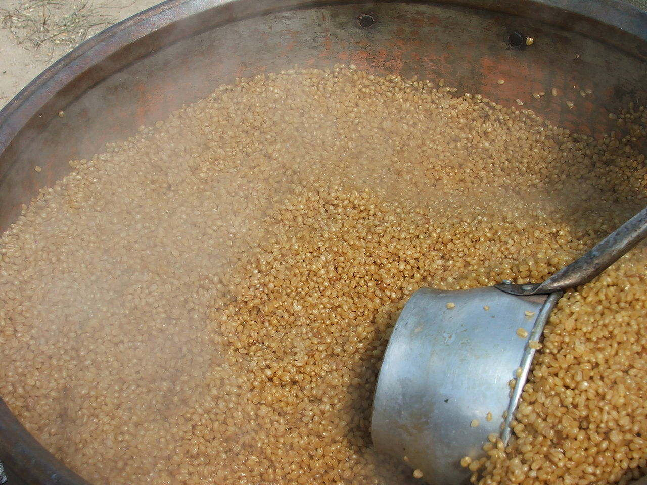 Bulgur yapımına hazırlık için buğdayın kaynatılması safhası resmi